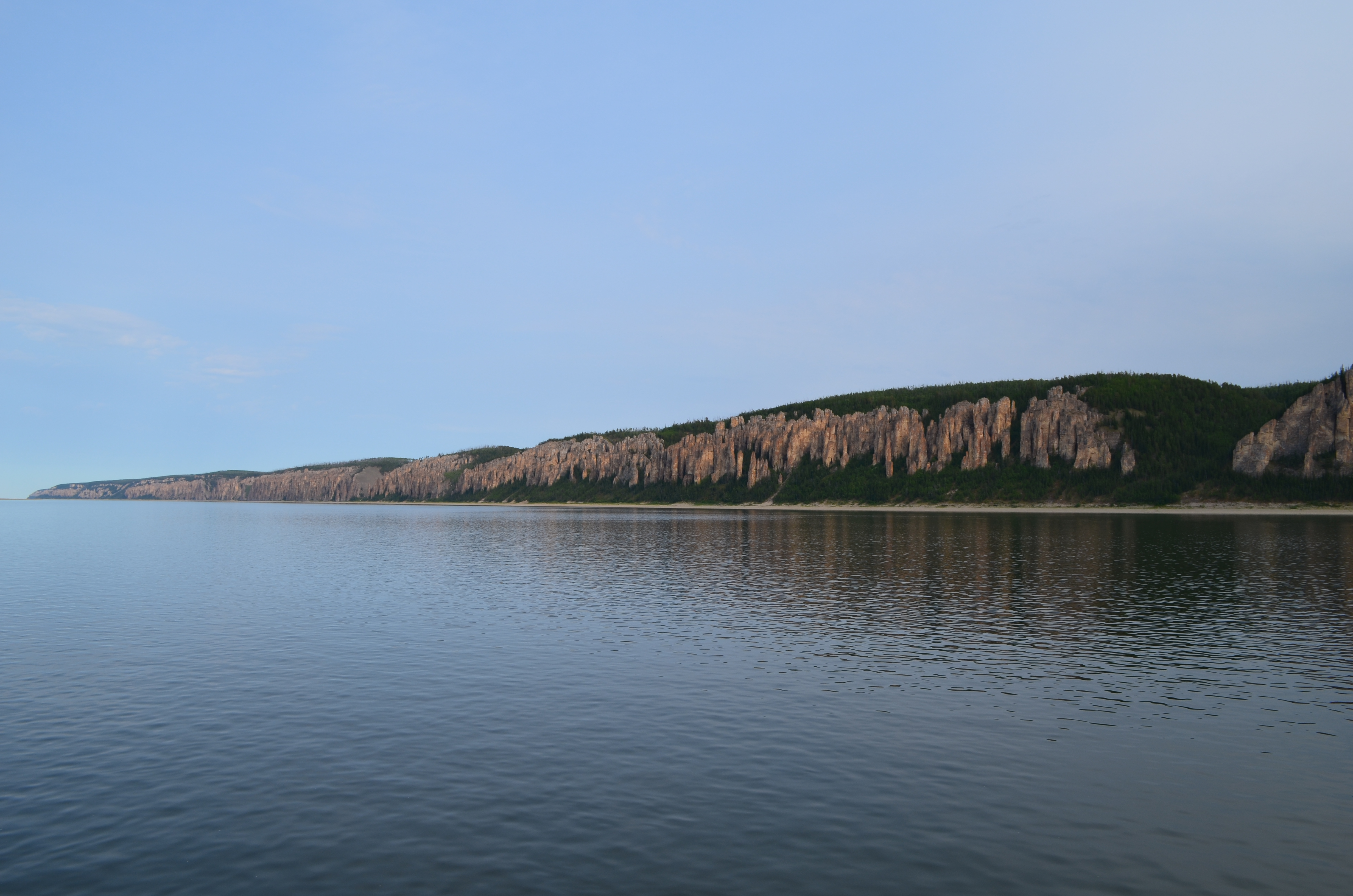 Поездка на Ленские столбы на теплоходе «Демьян Бедный», 31.07.2015 - 02.08.2015. День второй. Теплоход подходит к острову, на котором состоится первая "зелёная стоянка". Вид на правый берег реки и на Столбы.